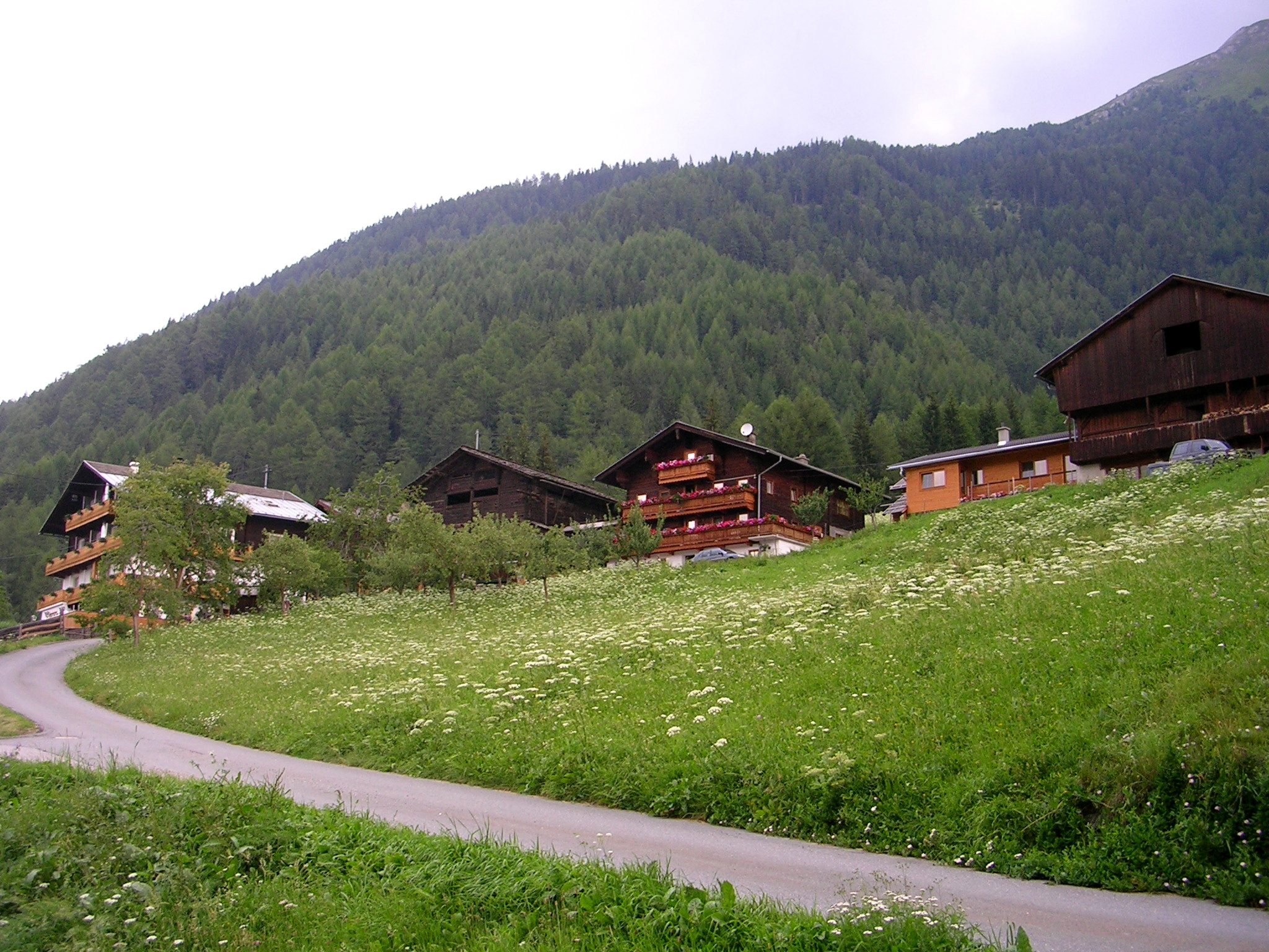 Marin, gesehen von der Kapelle